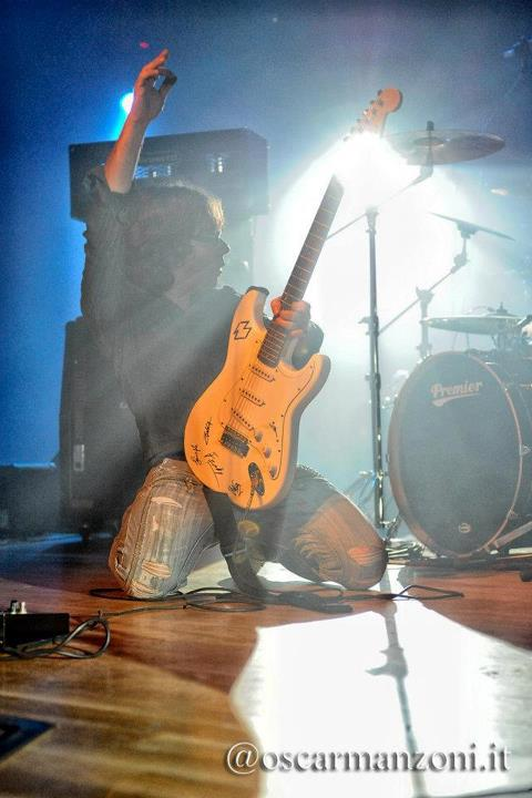 Franco Giaffreda Chitarrista, Cantante, Compositore Italiano